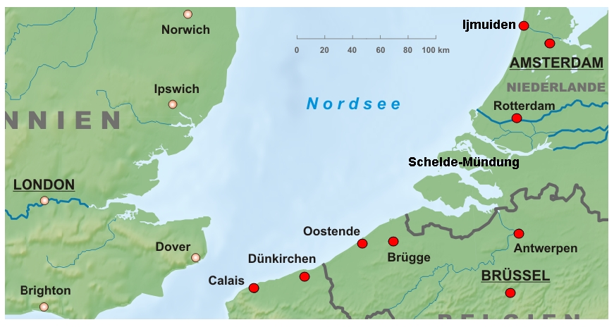 Ärmelkanal